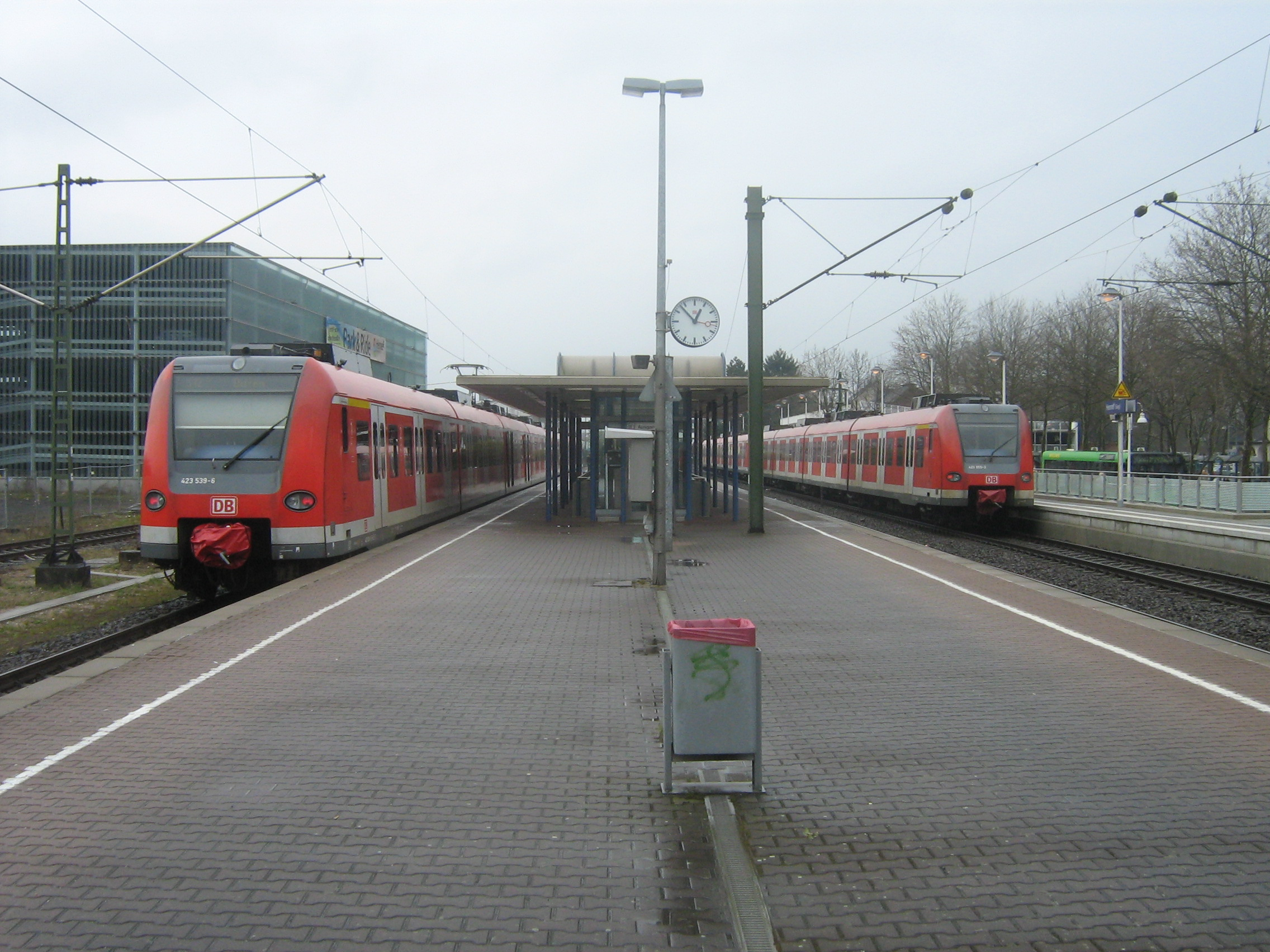 Zwei S-Bahnen auf der S12 in Hennef (Sieg)